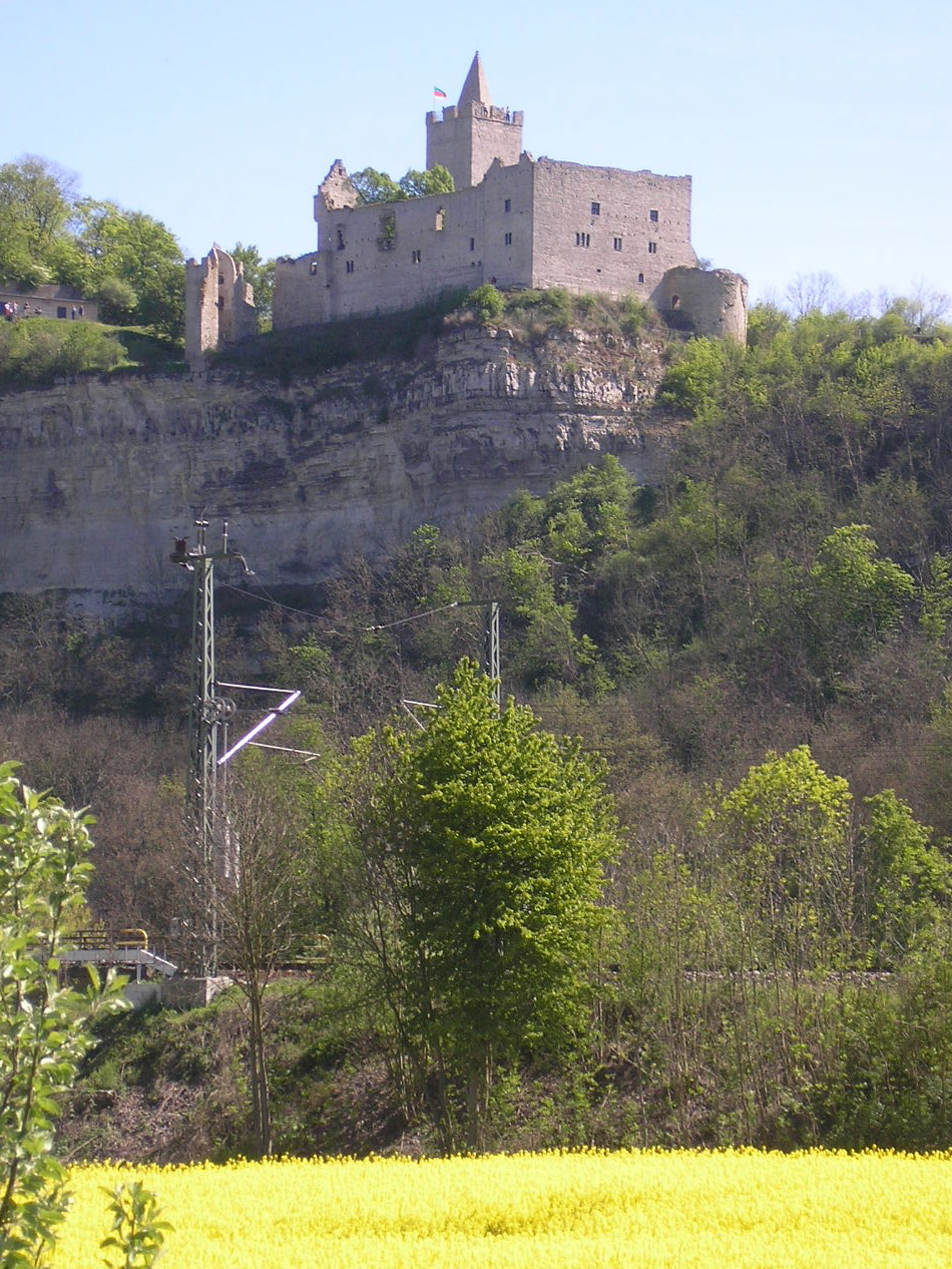 Rudelsburg bei Naumburg im Saaletal